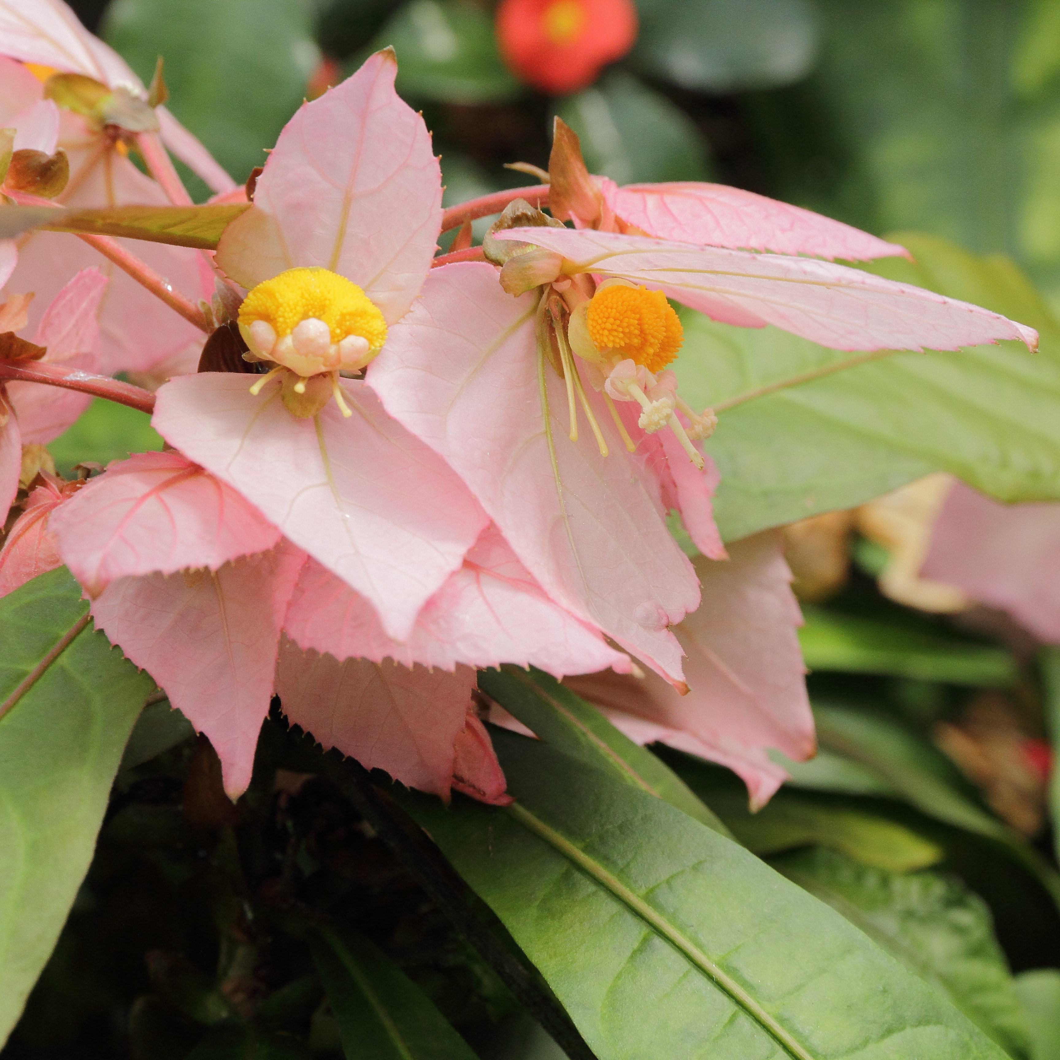 Dalechampia spathulata i Bergianska trädgården.